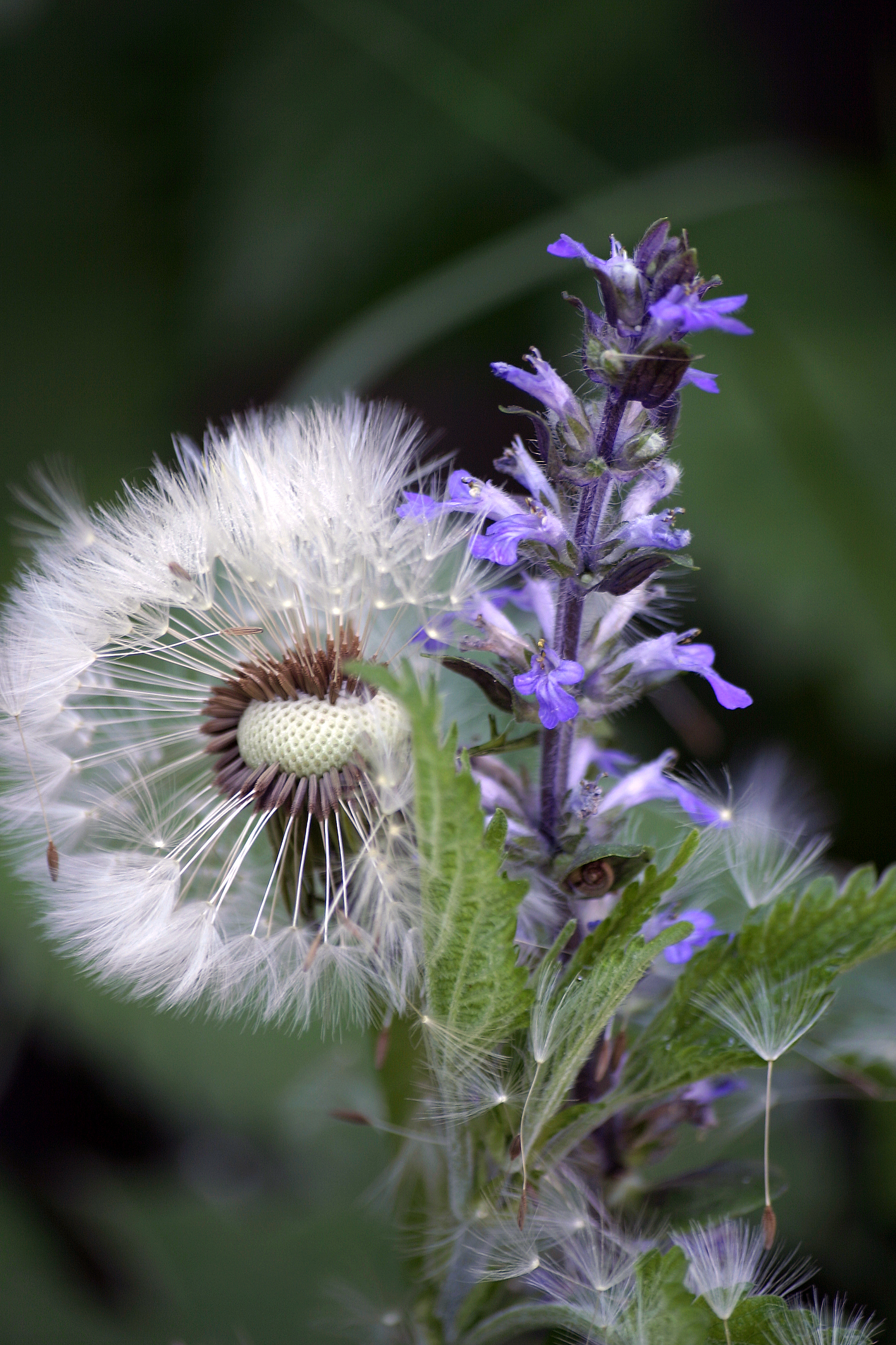 regrat (dandelion; Die Kuhblume, der Löwenzahn)